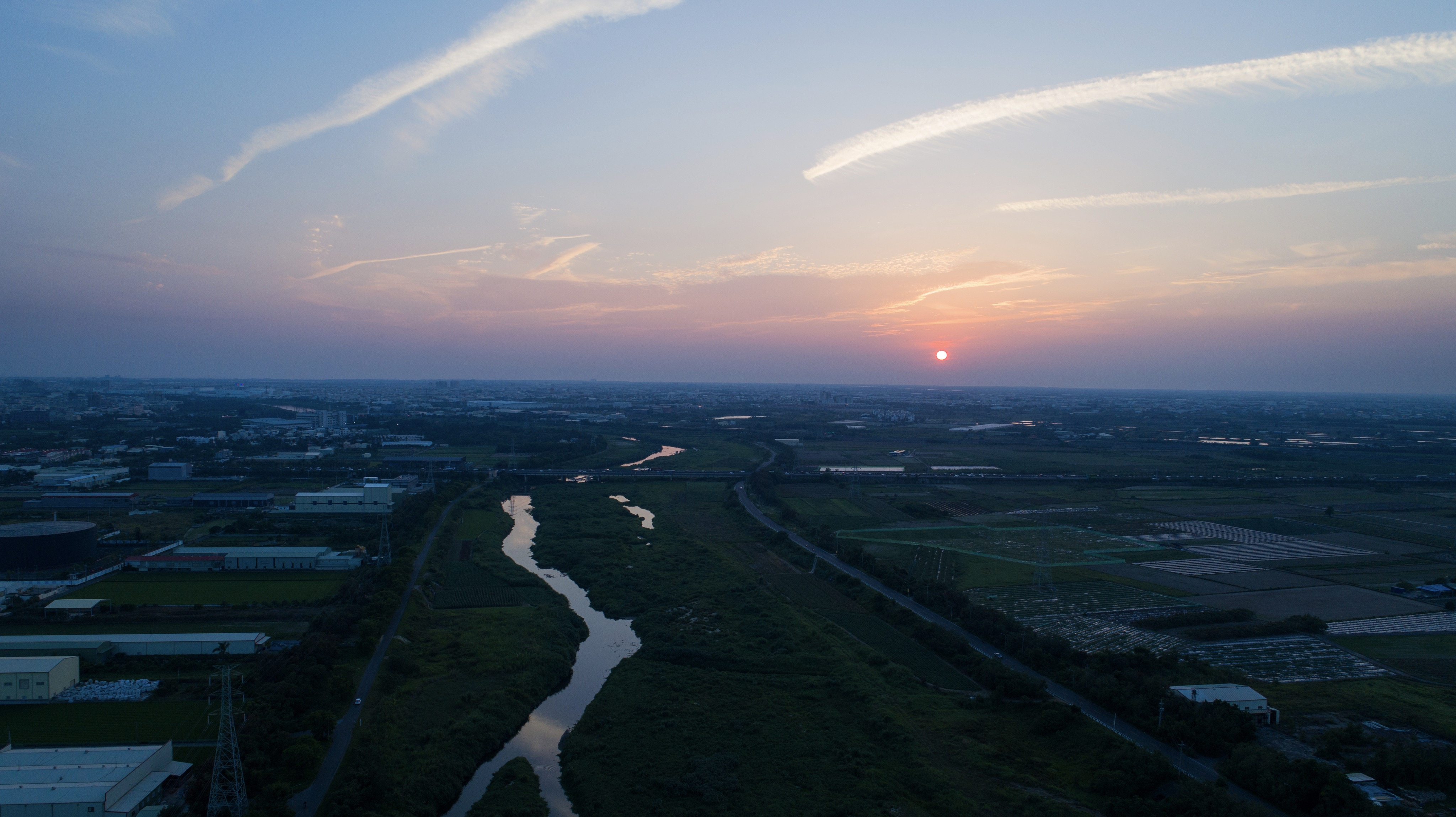 中文（台灣）: 流經台南市新市區的鹽水溪